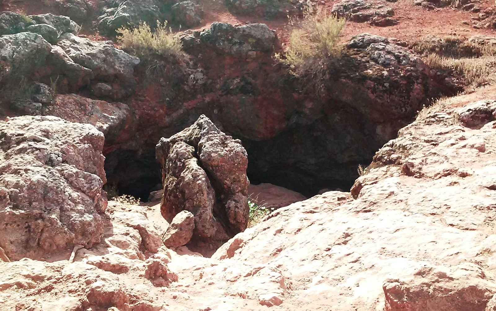 Entrada a la Cueva de Montesinos, Ossa de Montiel, Albacete, España.